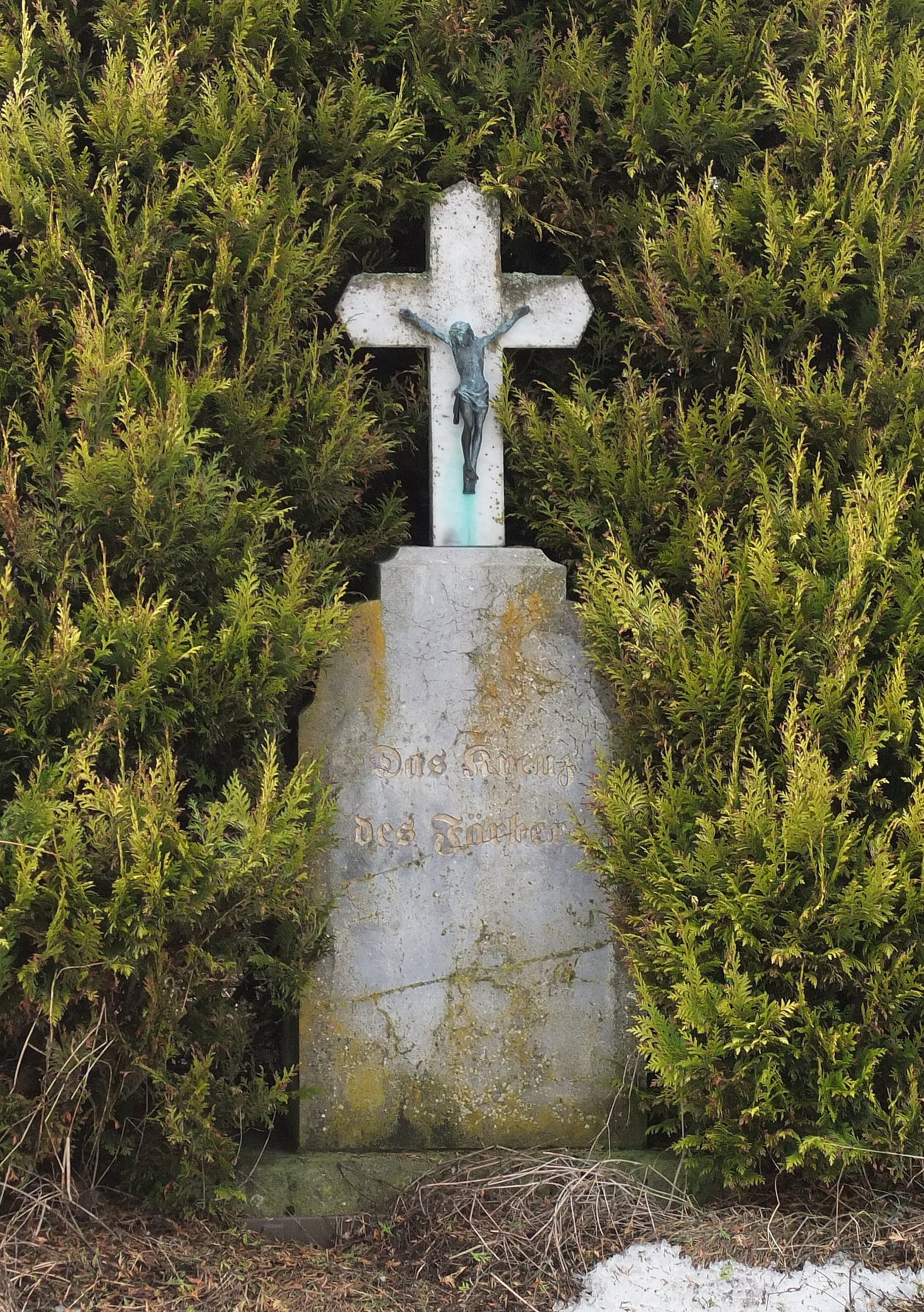 Wegekreuz, "Kreuz des Färbers" nahe Berscheid